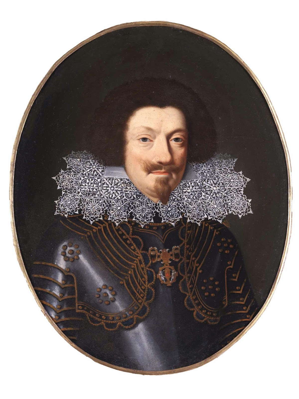 Ritratto di Carlo I Gonzaga